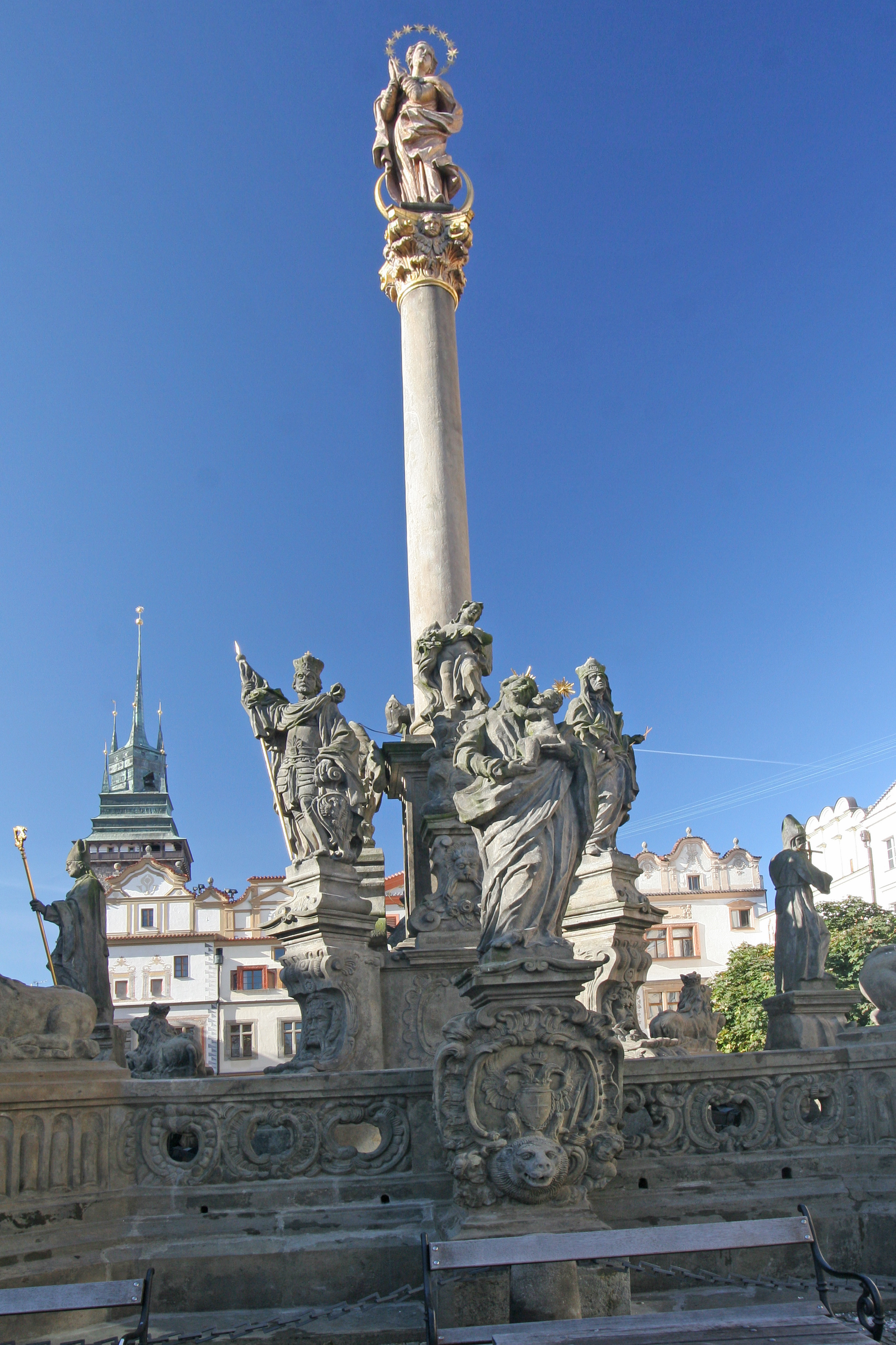 Morový sloup, Pernštýnské nám., Pardubice